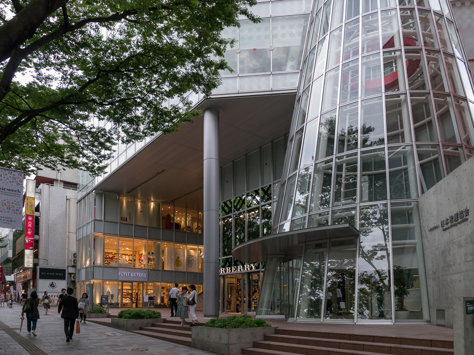 日本看護協会ビル、東京都渋谷区神宮前。